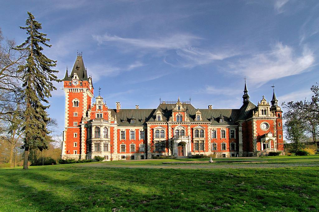 Zespół pałacowo-parkowy: pałac z kaplicą, oficyna ze stajnią i wozownią, park Pławniowice, ul. Gliwicka 46, Rudziniec